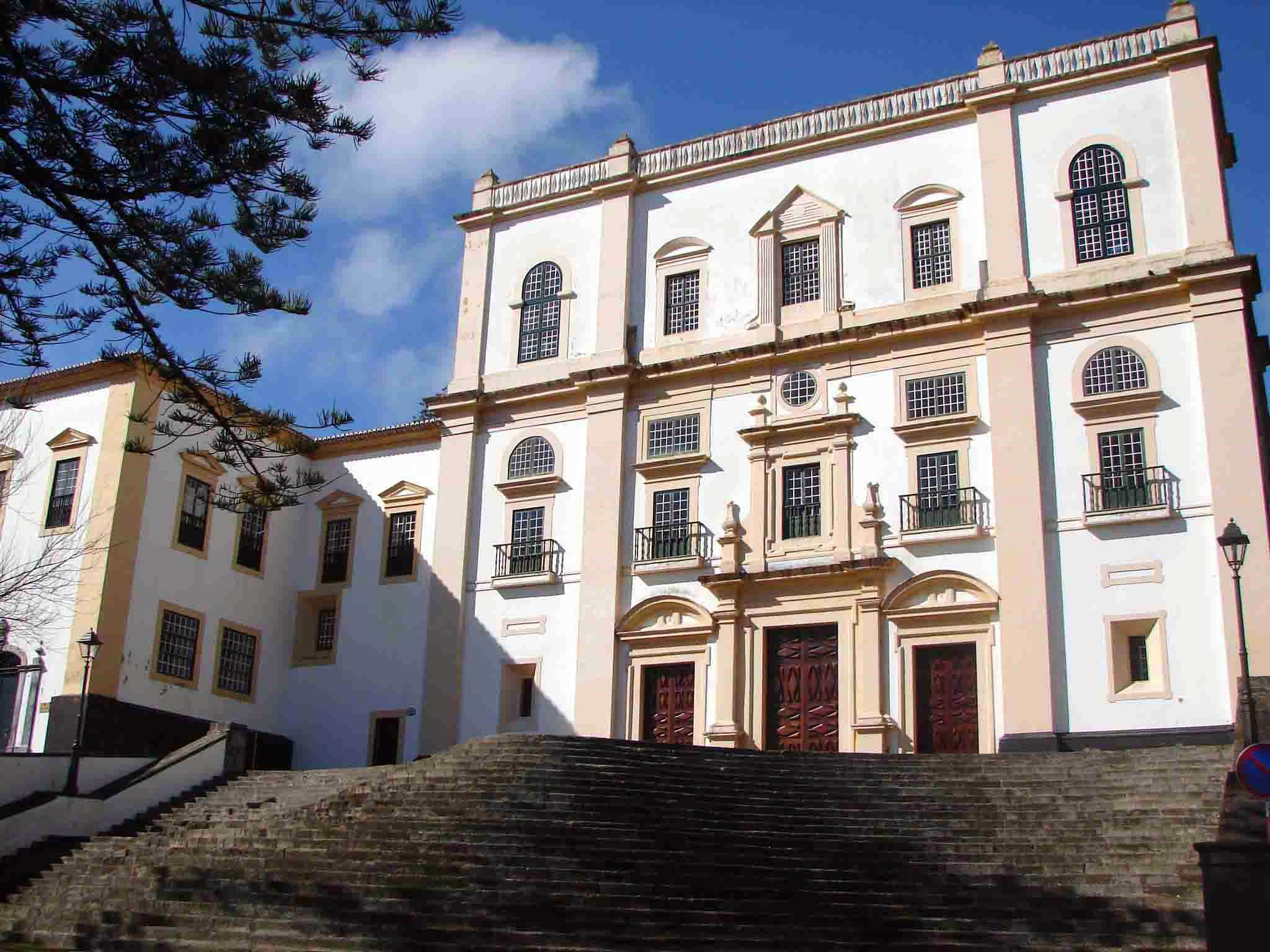 Palacio dos Capitães Generais, Igreja, ilha Terceira, Açores, Portugal.